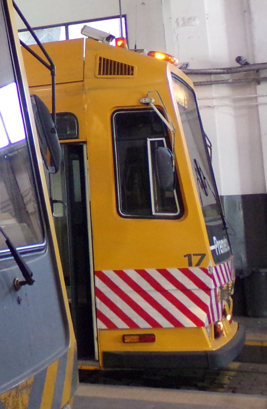 Estación Intendente Julio César Saguier del Premetro de Buenos Aires.